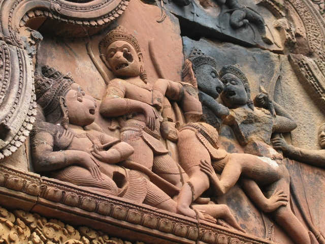 Ramayana monkey warriors in a relief at Angkor.